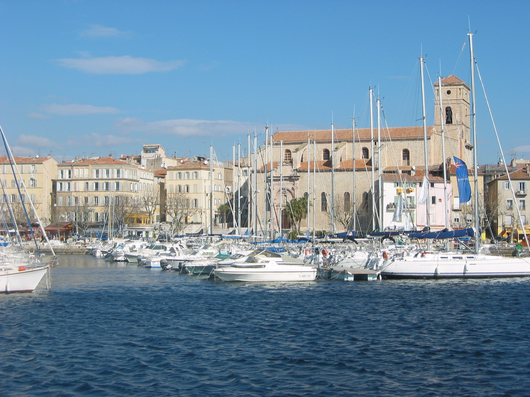 Port de La Ciotat, Bouches-du-Rhône, France. En arrière plan, l'Église Notre-Dame-de-l'Assomption ou Notre-Dame-du-Port.